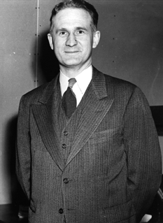 Fotografía del físico Walter Henry Zinn.